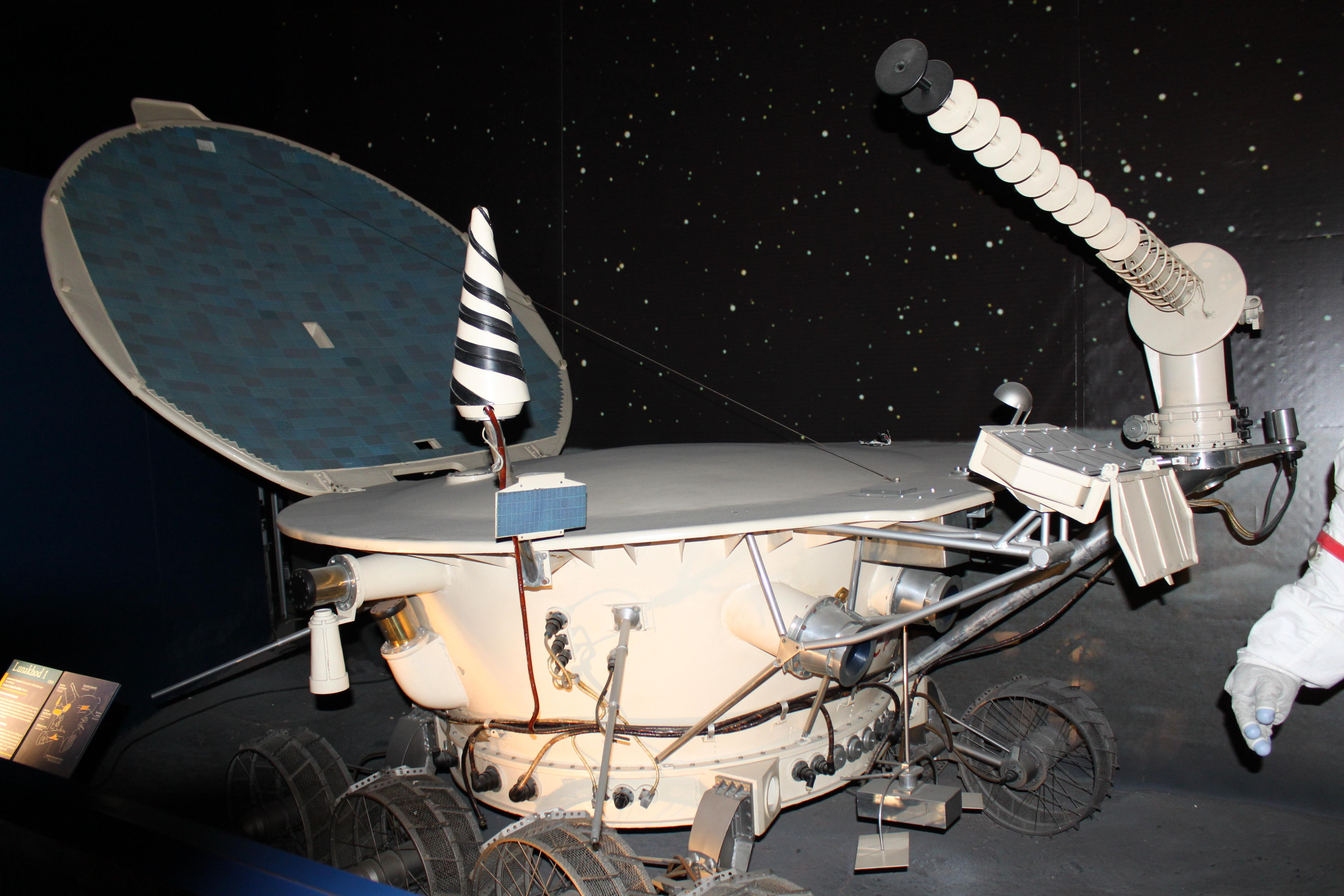 Ein Lunakhod im Musée de l'air in Le Bourget